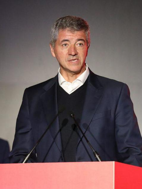 Son citas para agendar, eventos que constituyen un buen centenar de razones para visitar Madrid durante el próximo año. Turismo del Ayuntamiento de Madrid ha querido glosarlas todas en una guía que recomienda a madrileños y visitantes eso: hacer huecos en sus agendas del próximo año. Hay propuestas para todos y de todo –música, cultura, deportes, congresos…- que situarán a Madrid como destino de referencia en el ámbito cultural, artístico, gastronómico o deportivo. La guía, titulada ‘Save the date 2019’, ha sido presentada esta mañana, lunes 17 de diciembre, en CentroCentro con la presencia de la alcaldesa, Manuela Carmena; el coordinador general de Alcaldía, Luis Cueto, conductor del acto; el director de Turismo, Miguel Sanz, y algunos de los protagonistas de esas grandes “entradas” en la agenda madrileña del año próximo.